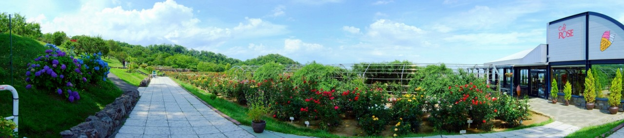 Chizaki rose garden FinePix F30 2008.8.1